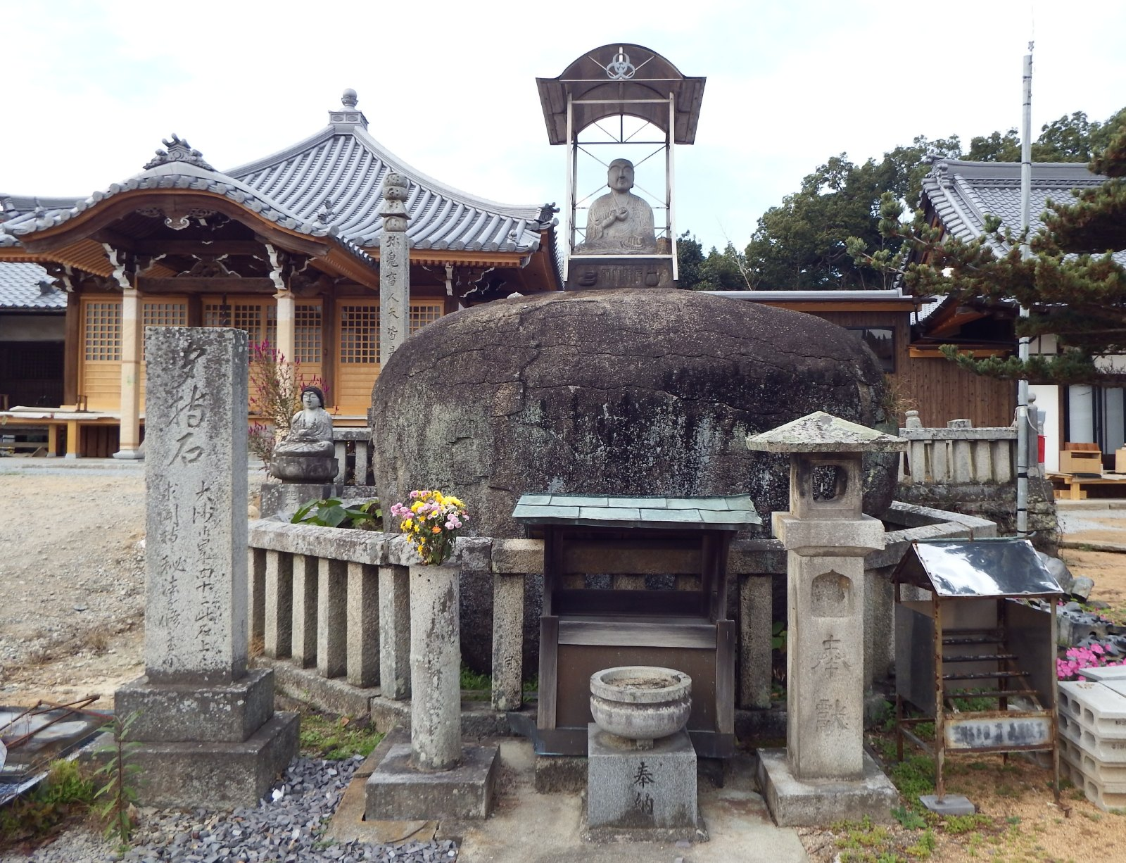 松浦寺遍照院